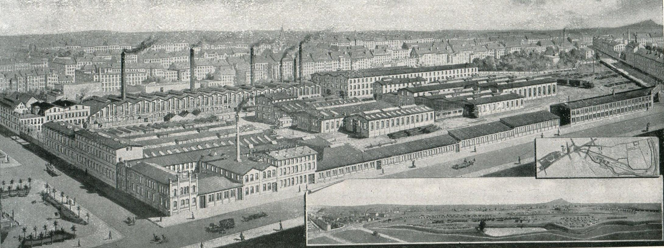 Abbildung des Werkes I des Görlitzer Waggonbaus um 1900